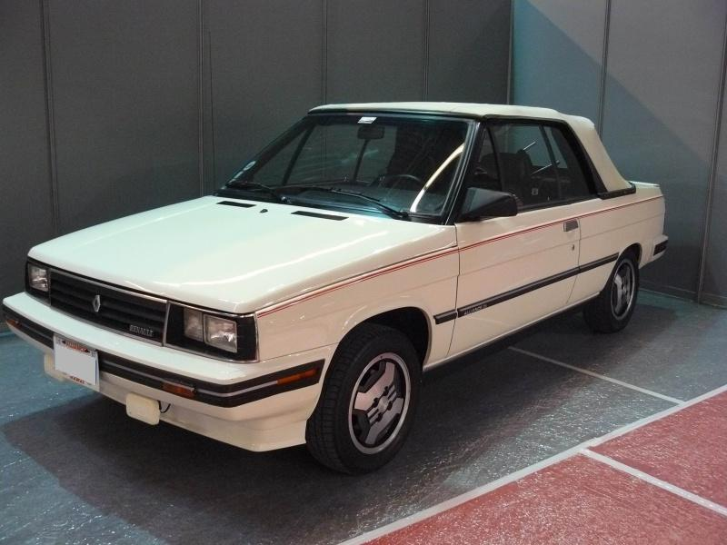 Retromobile 2012